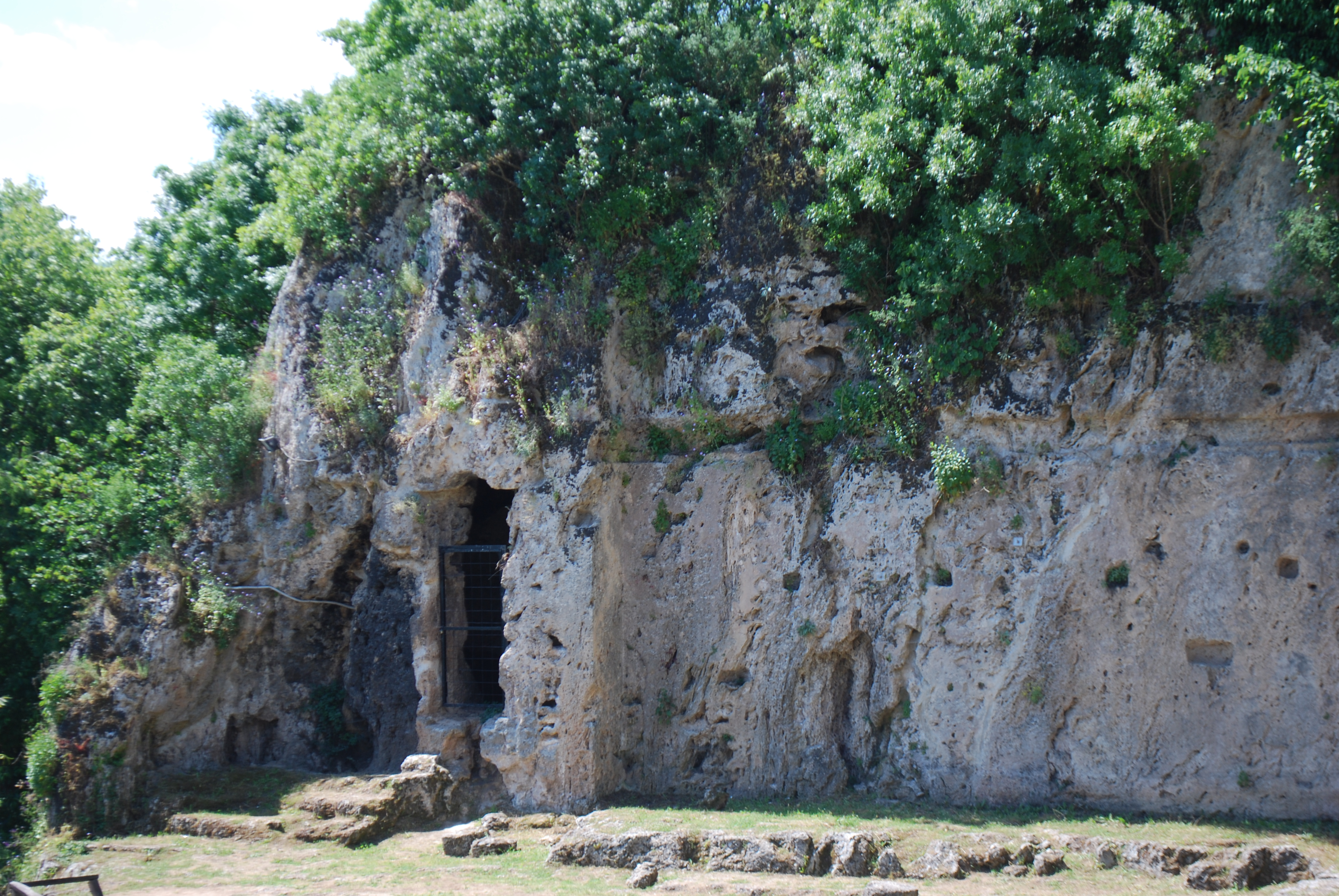 Vue des ruines de l'école où Aristote enseigna à Alexandre, sur le site de l'ancienne Mieza, en Macédoine.